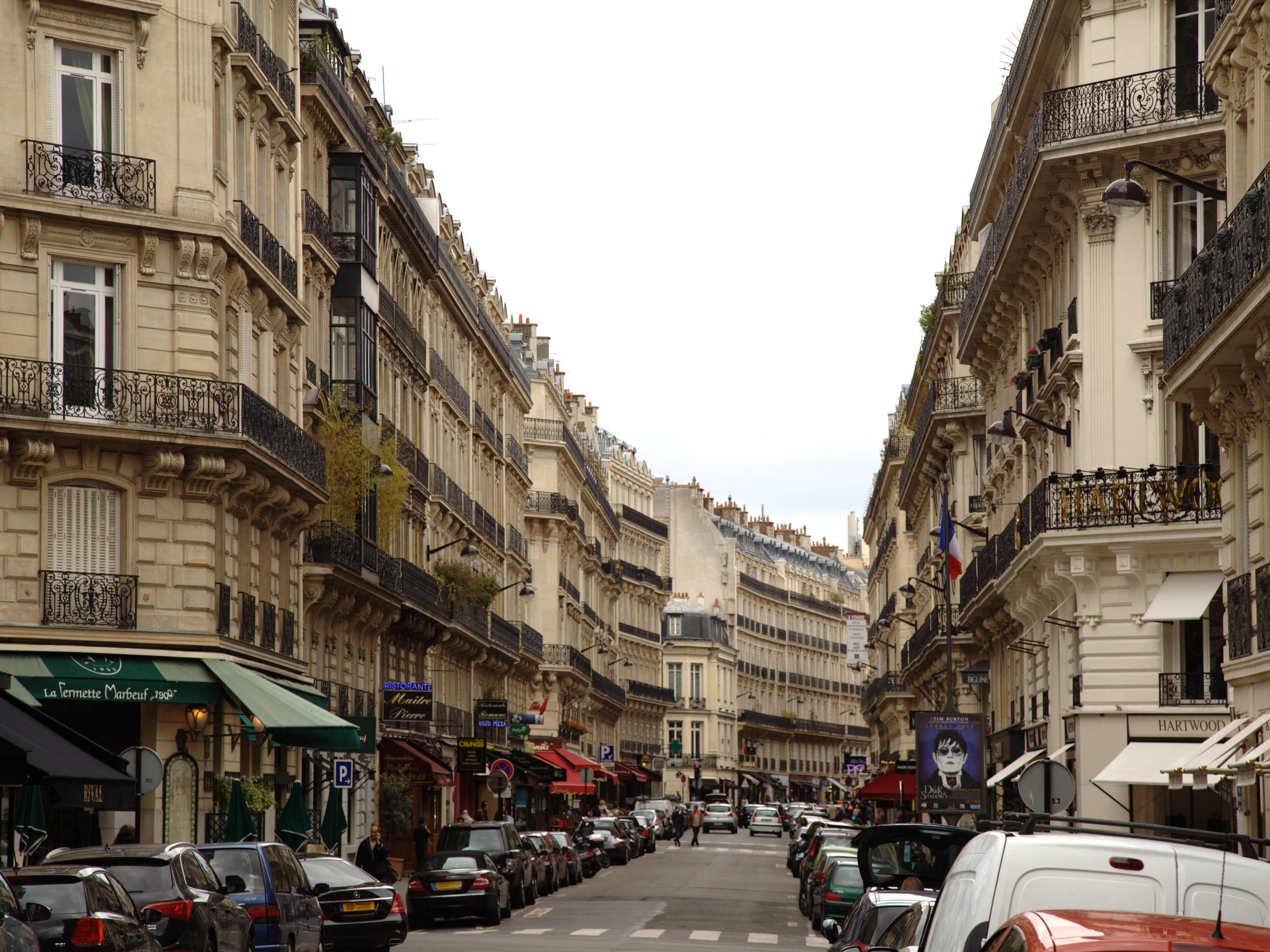 La rue Marbeuf à Paris, vue depuis l'avenue Georges-V